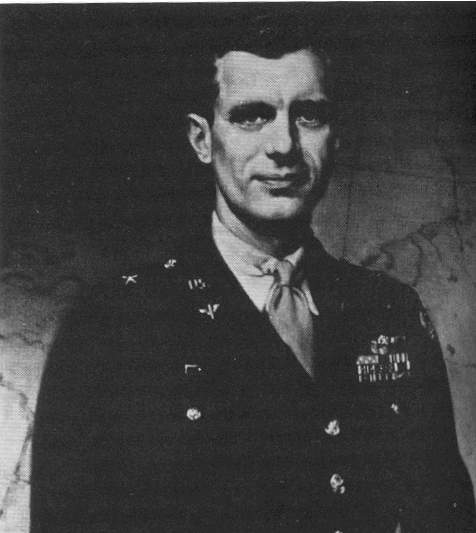 Portarretrato de Frederick Castle